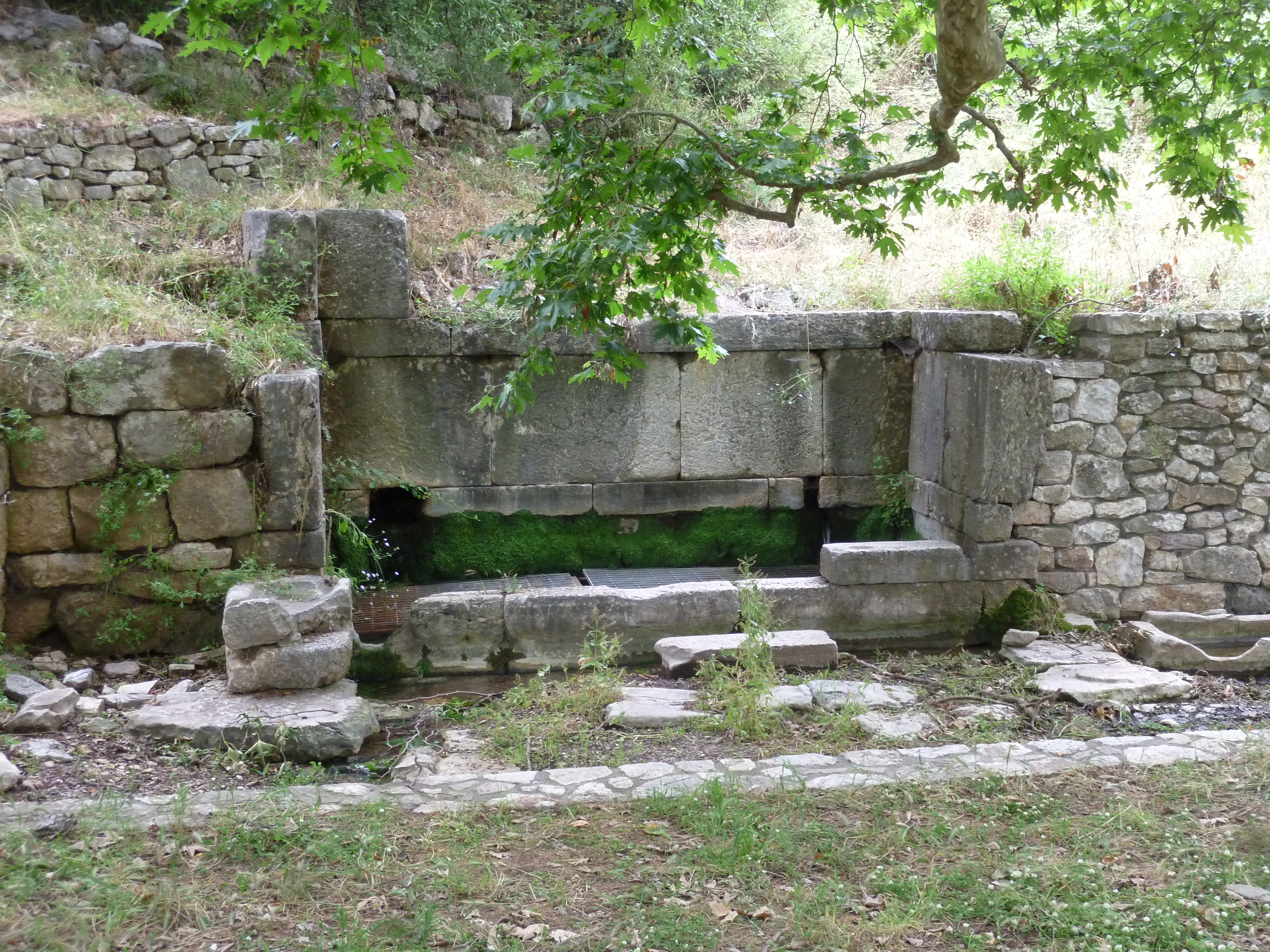 Fontaine antique à Phigaleia (Grèce)